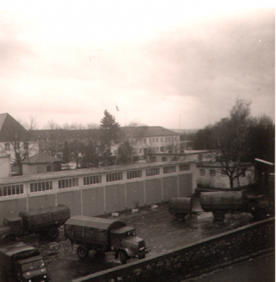 Fritsch Kaserne in Koblenz. Blick vom Gebäude der 1/153